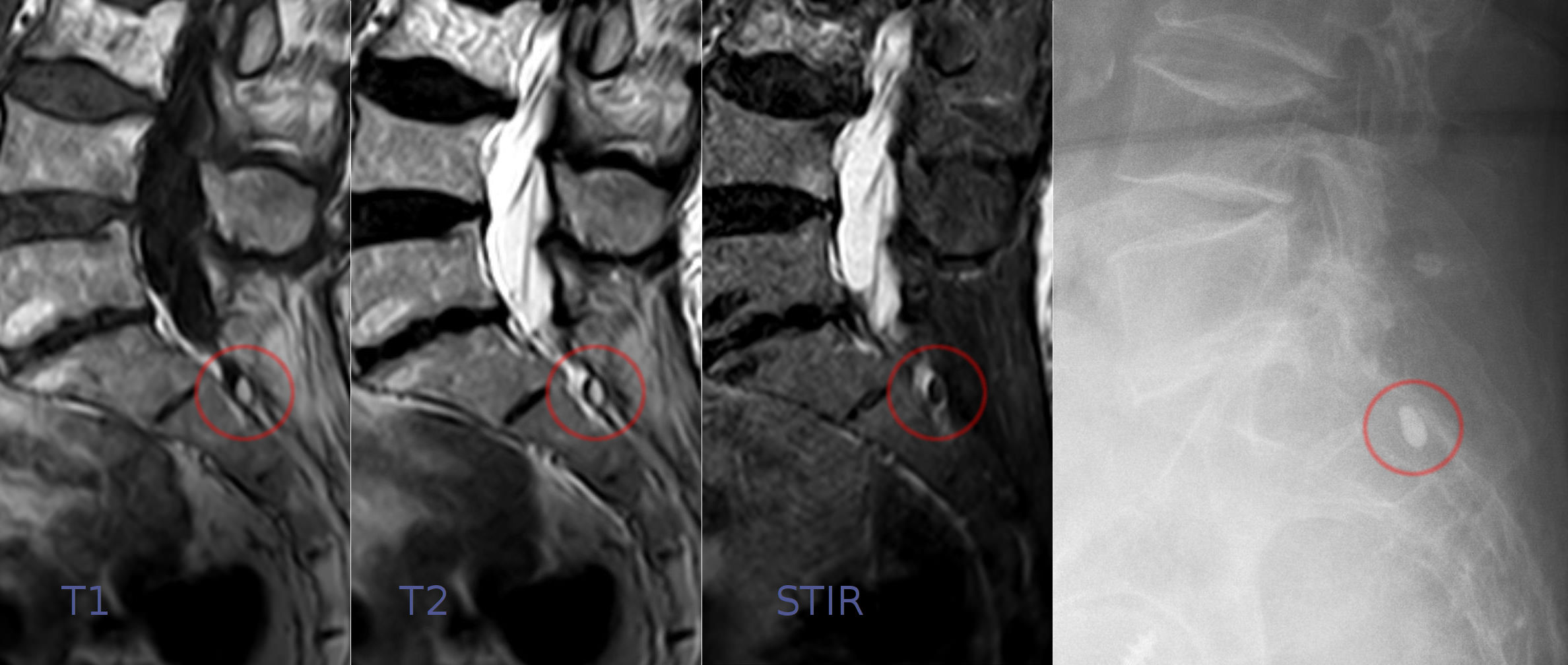 Lipiodolrest nach Myelographie bei einer alten Frau. In der Röntgenaufnahme rechts sieht man den ovalen, röntgendichten Fleck in Projektion auf den sakralen Spinalkanal. In der MRT ist der Befund in T1 und T2 hell, in der STIR-Sequenz dunkel (Fett!). Entsprechend verhalten sich die verfetteten Zonen um den lumbosakralen Diskus.